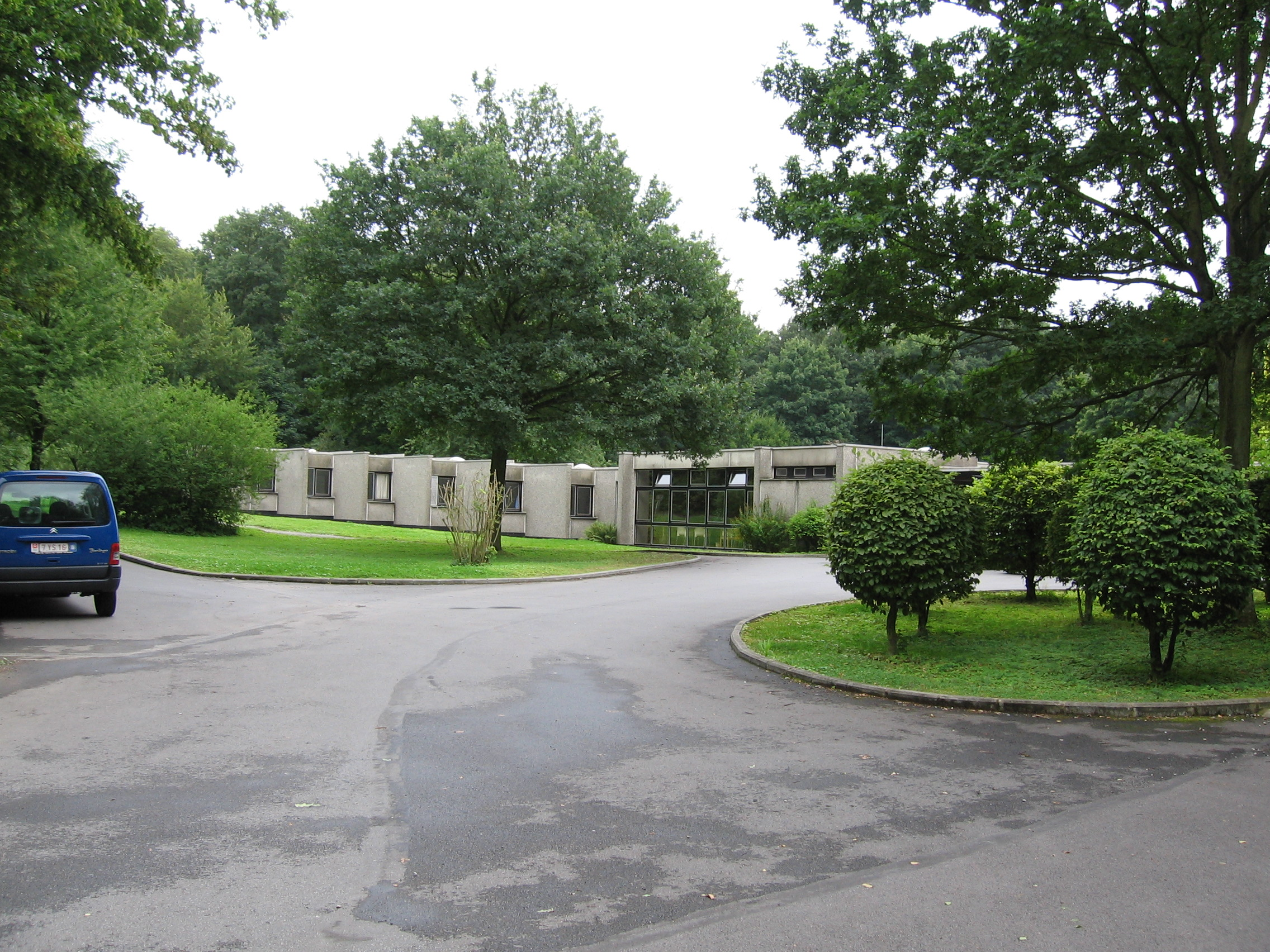 L'abbaye de Soleilmont reconstruite (en 1973) dans les bois de Soleilmont (Gilly, Belgique)